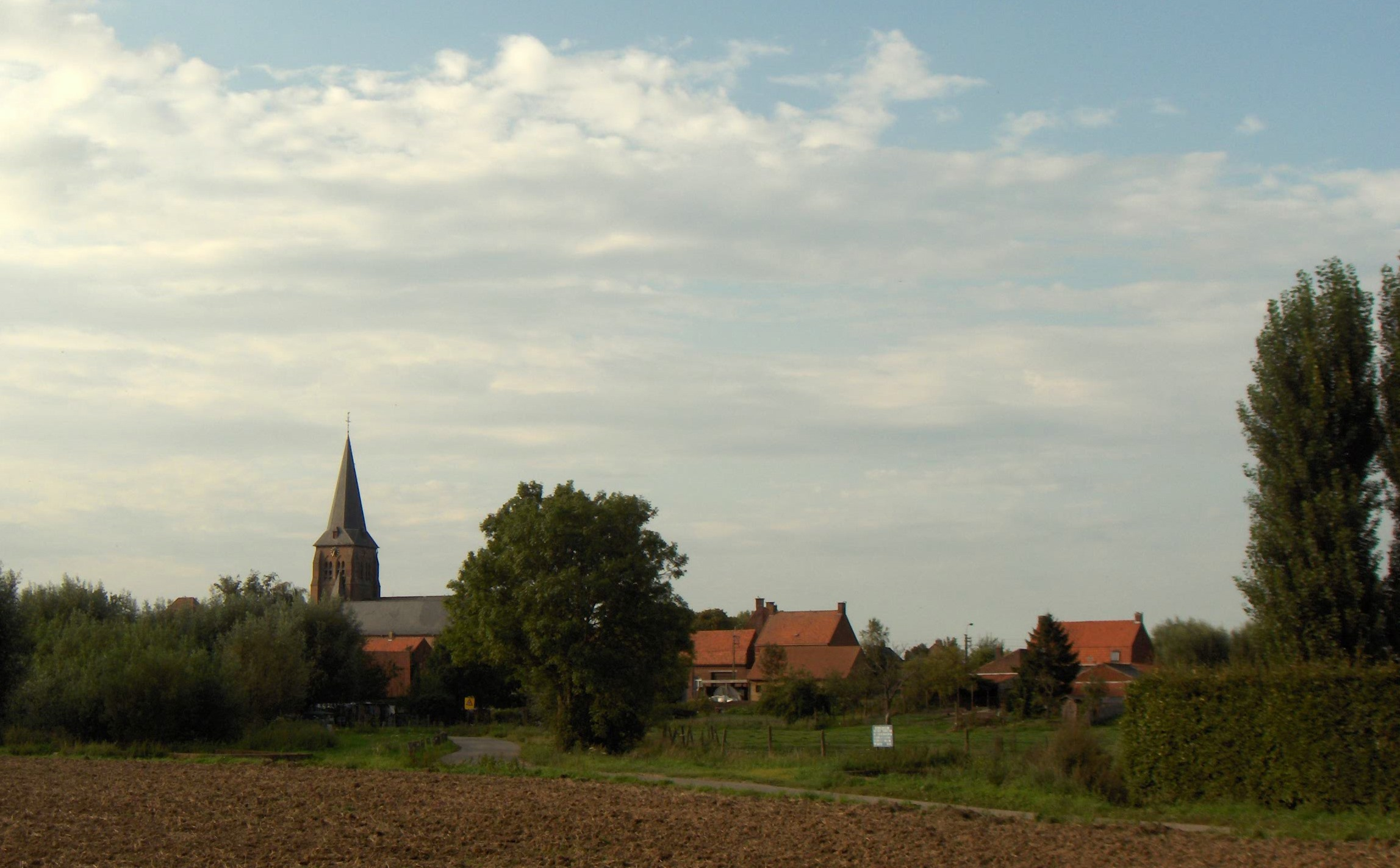 Wulvergem, Provinz Westflandern, Belgien. Blick von Süden